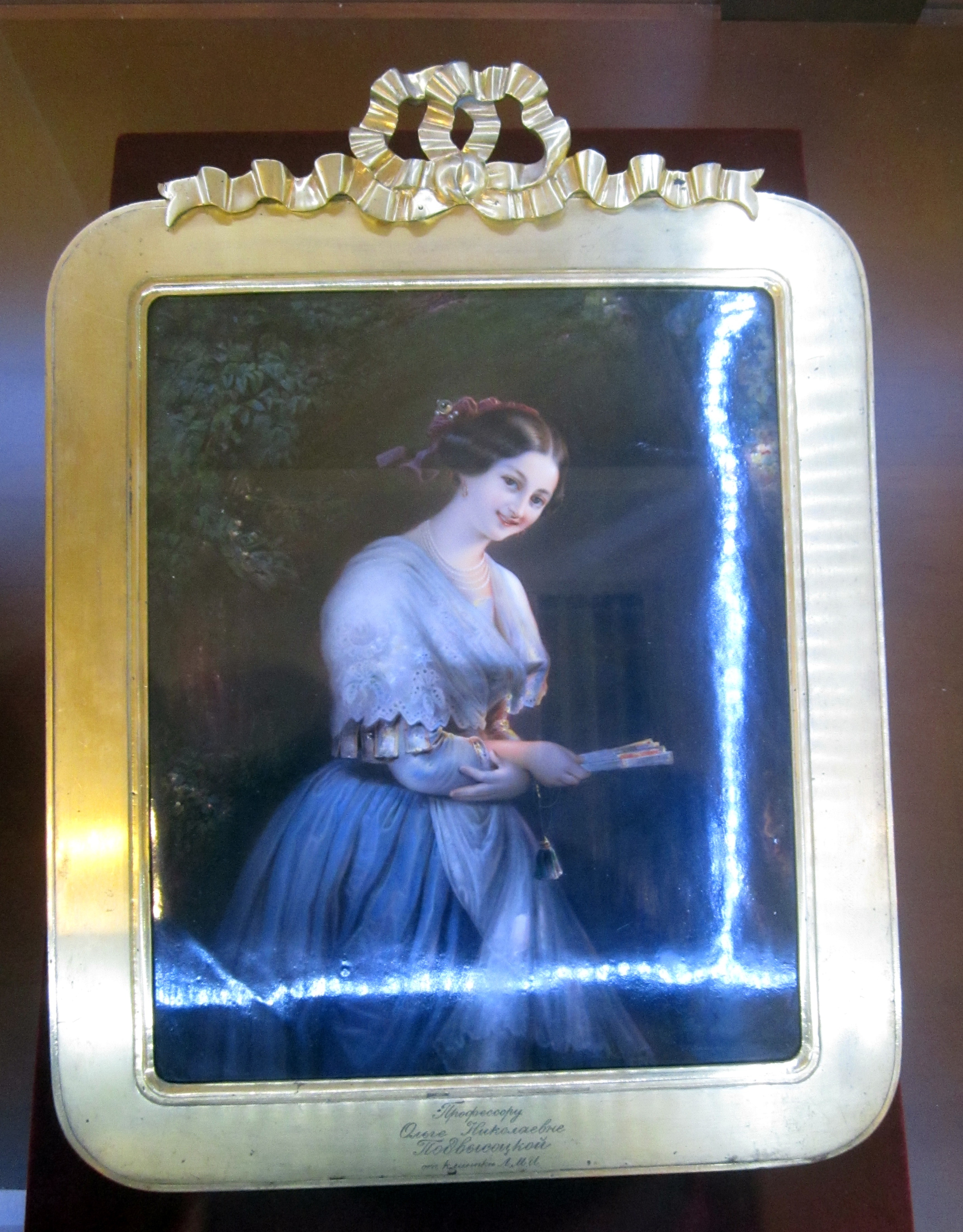 Панно "Портрет молодой женщины". 1837-44 гг., Германия, Берлин. Королевская фарфоровая фабрика. Художник Г. Швайцер. Фарфор. Роспись. Гравировка под изображением "Профессору Ольге Николаевне Подвысоцкой от клиники ЛМИ".